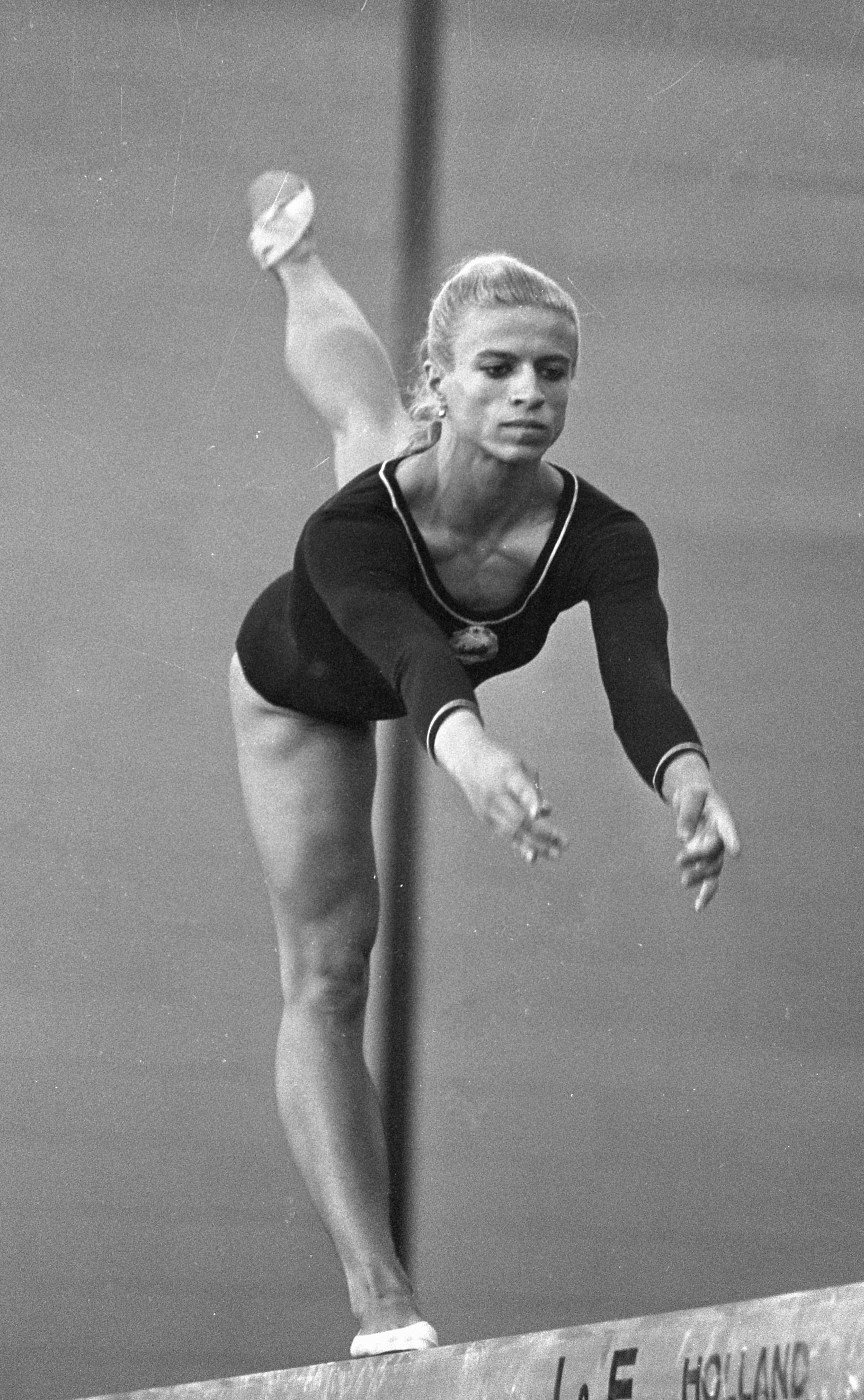 Turnen Nederland tegen Roemenie Dames. Elena Ceampelea (R) tijdens oefening evenwichtsbalk